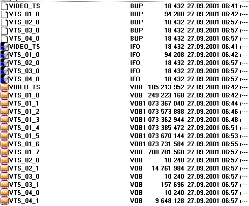 Файлова структура диску DVD-Video